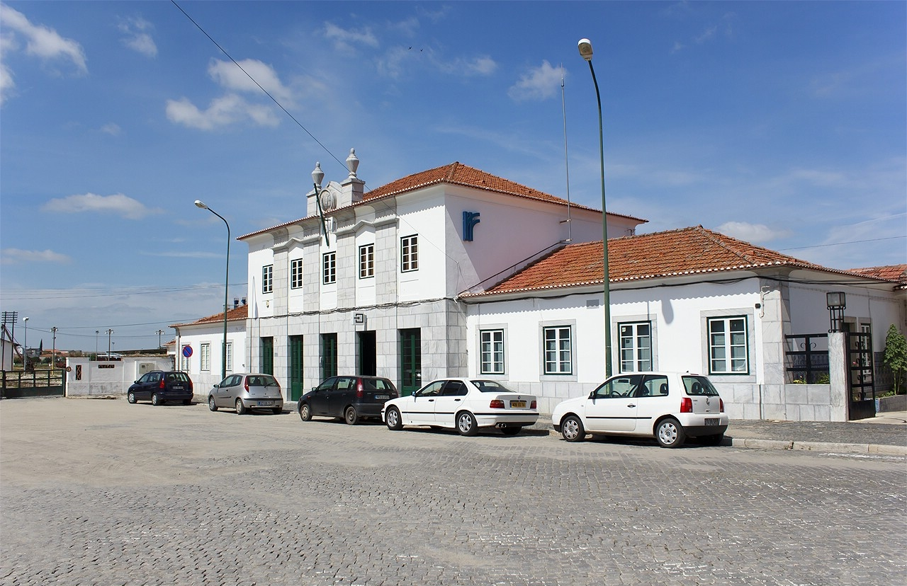 A estação de Beja, vista do lado de fora, ainda com serviço ferroviário de intercidades...